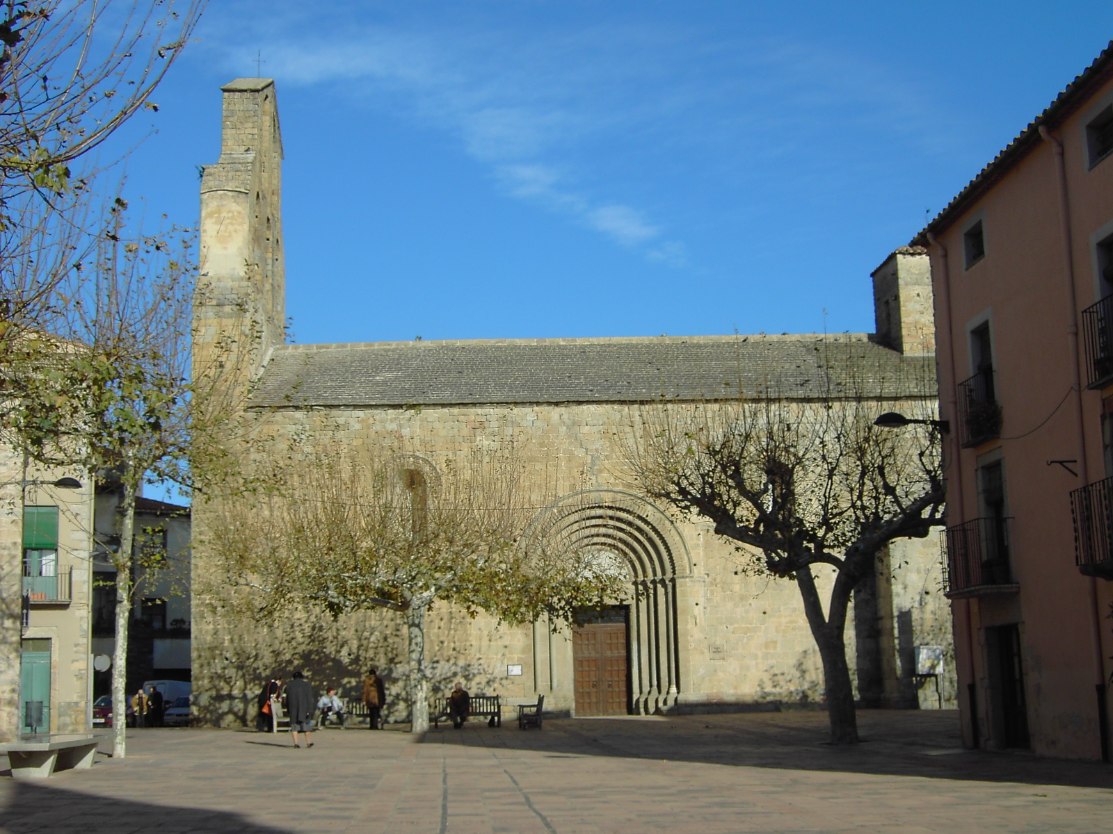 Iglesia de Santa María en Agullana (Alto Ampurdán, Gerona).